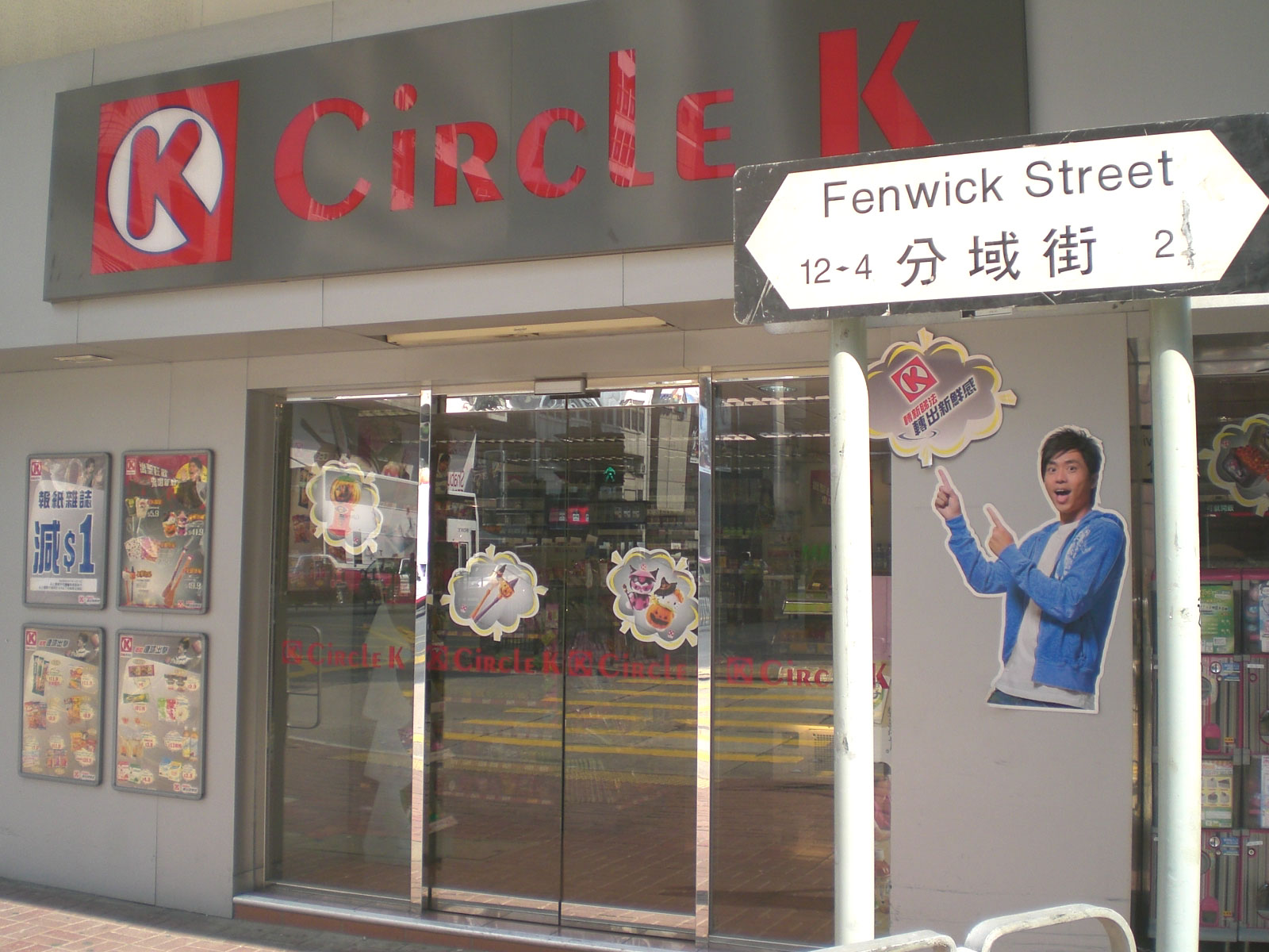 灣仔分域街OK便利店, Fenwick Street, Wan Chai, Hong Kong